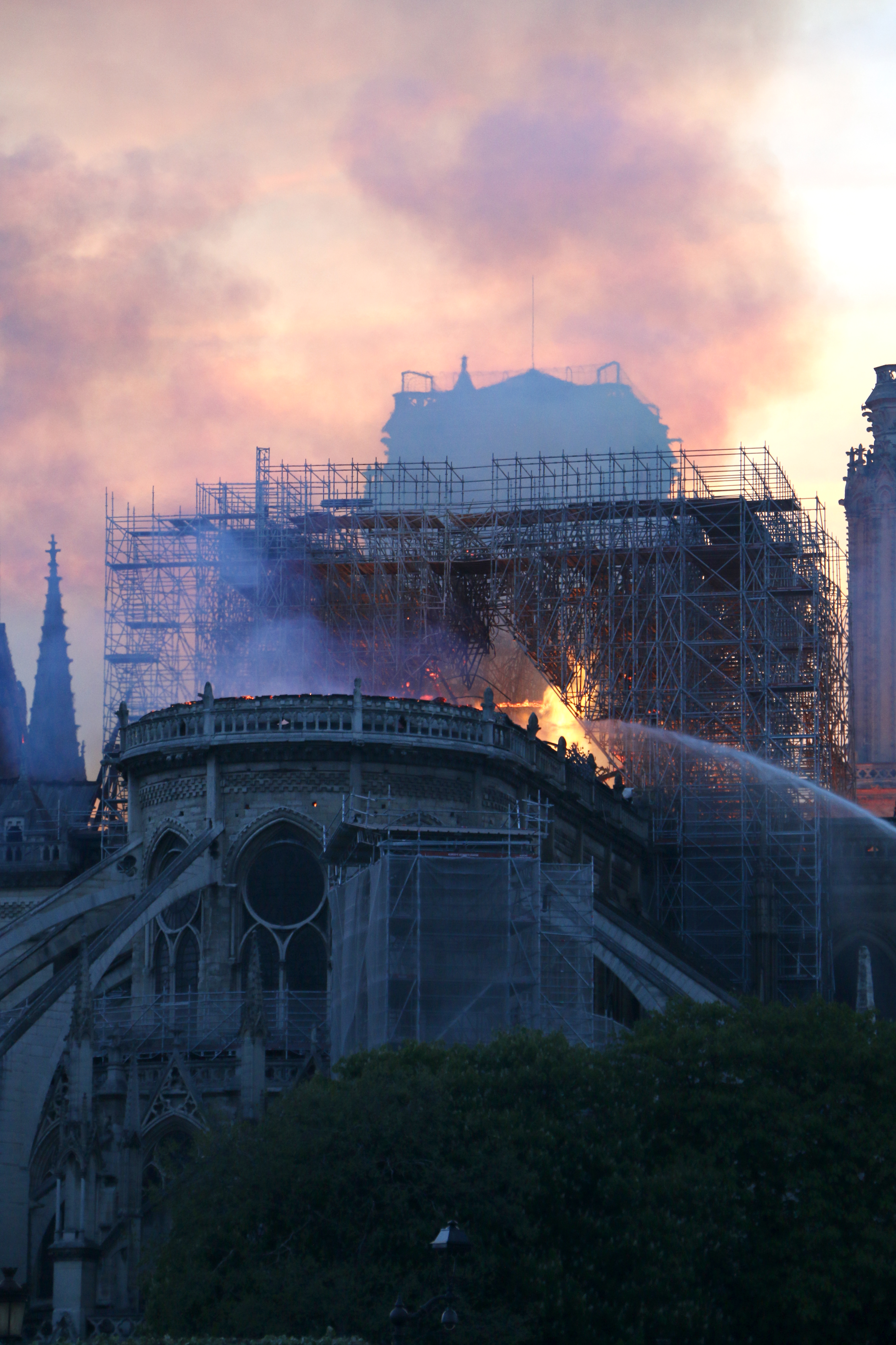 Incendie de la cathédrale notre dame de Paris (avril 2019) vu de l'île saint-Louis